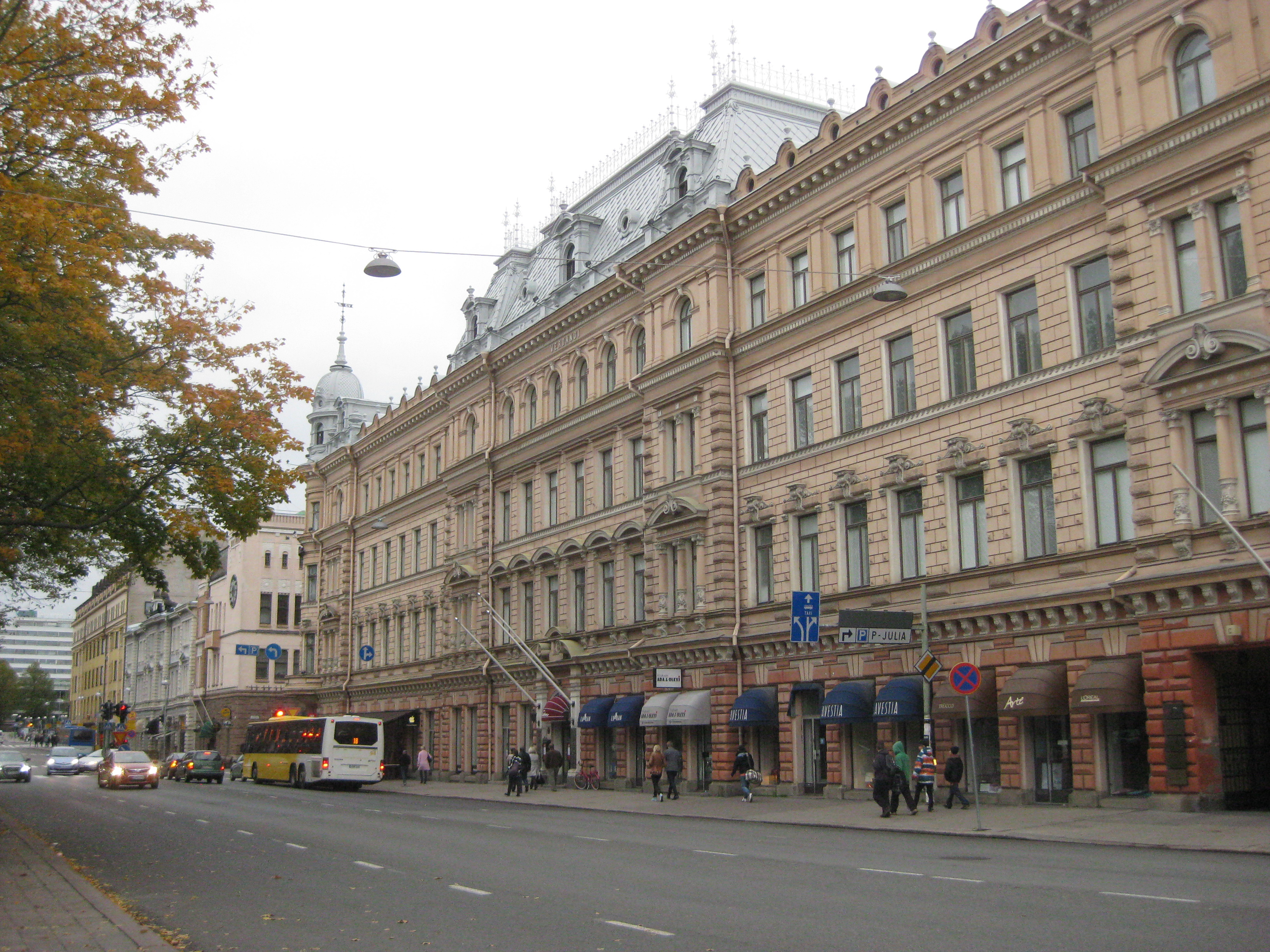 Frithiof Strandells planerade Verdandihuset (1898), Auragatan 1, Åbo